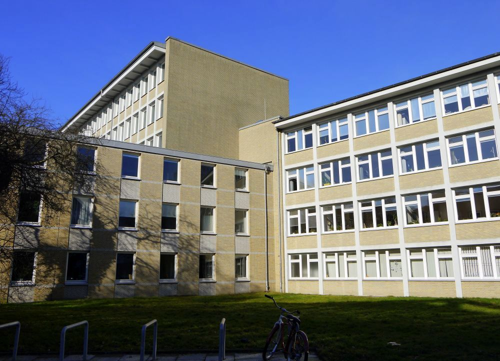 Seitenansicht Bezirksamt Hamburg Nord, Kümmellstraße 5, 23.02.2014